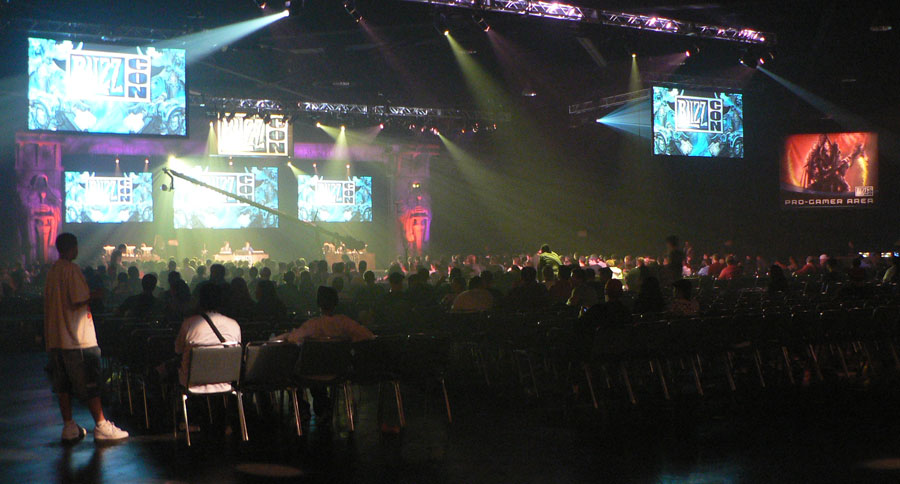 Starcraft Q&A